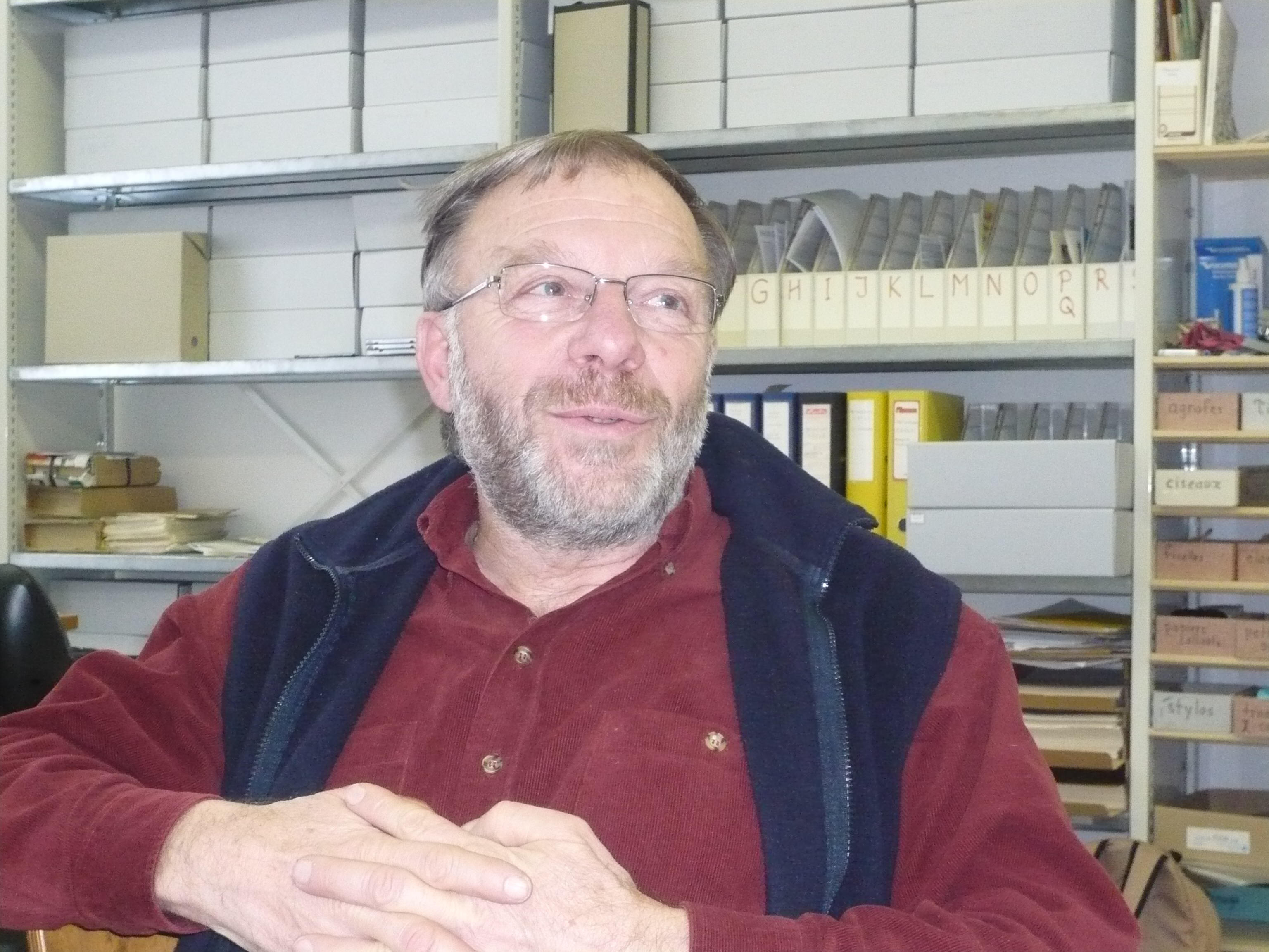 Politicien chaux-de-fonnier et neuchâtelois